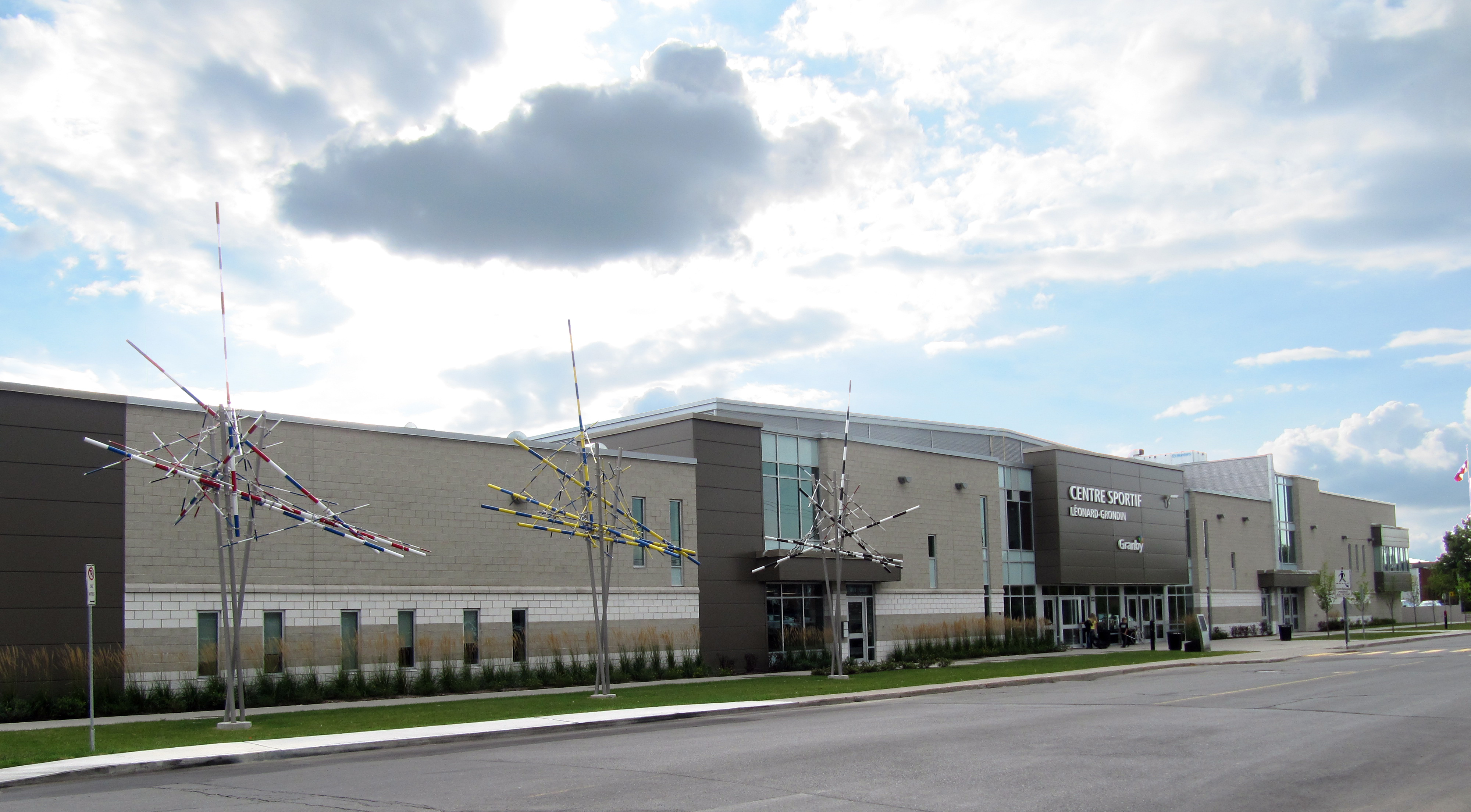 Centre sportif Léonard-Grondin (Granby, Québec) - façade